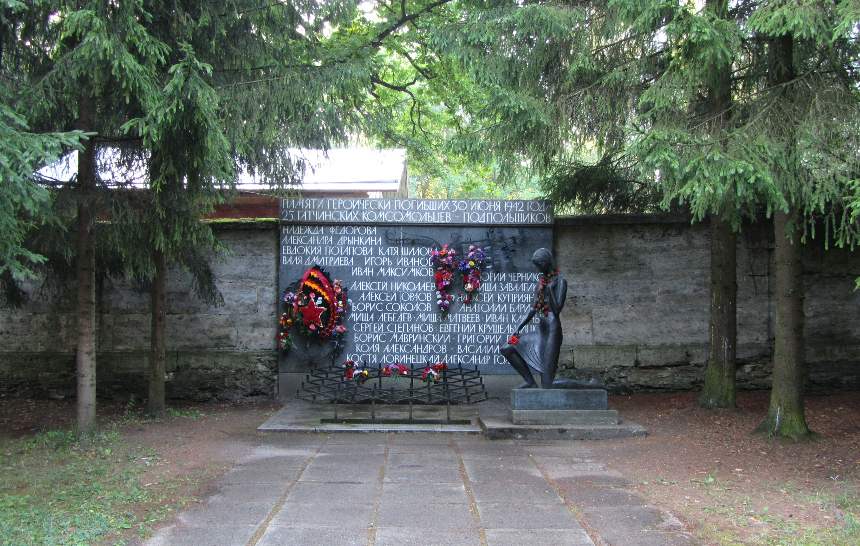 Памятник комсомольцам-подпольщикам у Сильвийских ворот